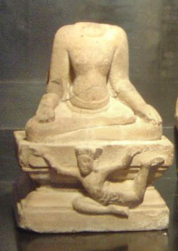 La diosa Níriti o Nairita, diosa relacionada con la muerte, la desgracia y la corrupción cuyo vájana es un ser humano. Parte de una serie de ídolos de la cultura cham (siglo X); que se encuentran en el santuario Mi Sön, provincia Quảng Nam (Vietnam). Edición de una foto de un usuario de wikimedia.